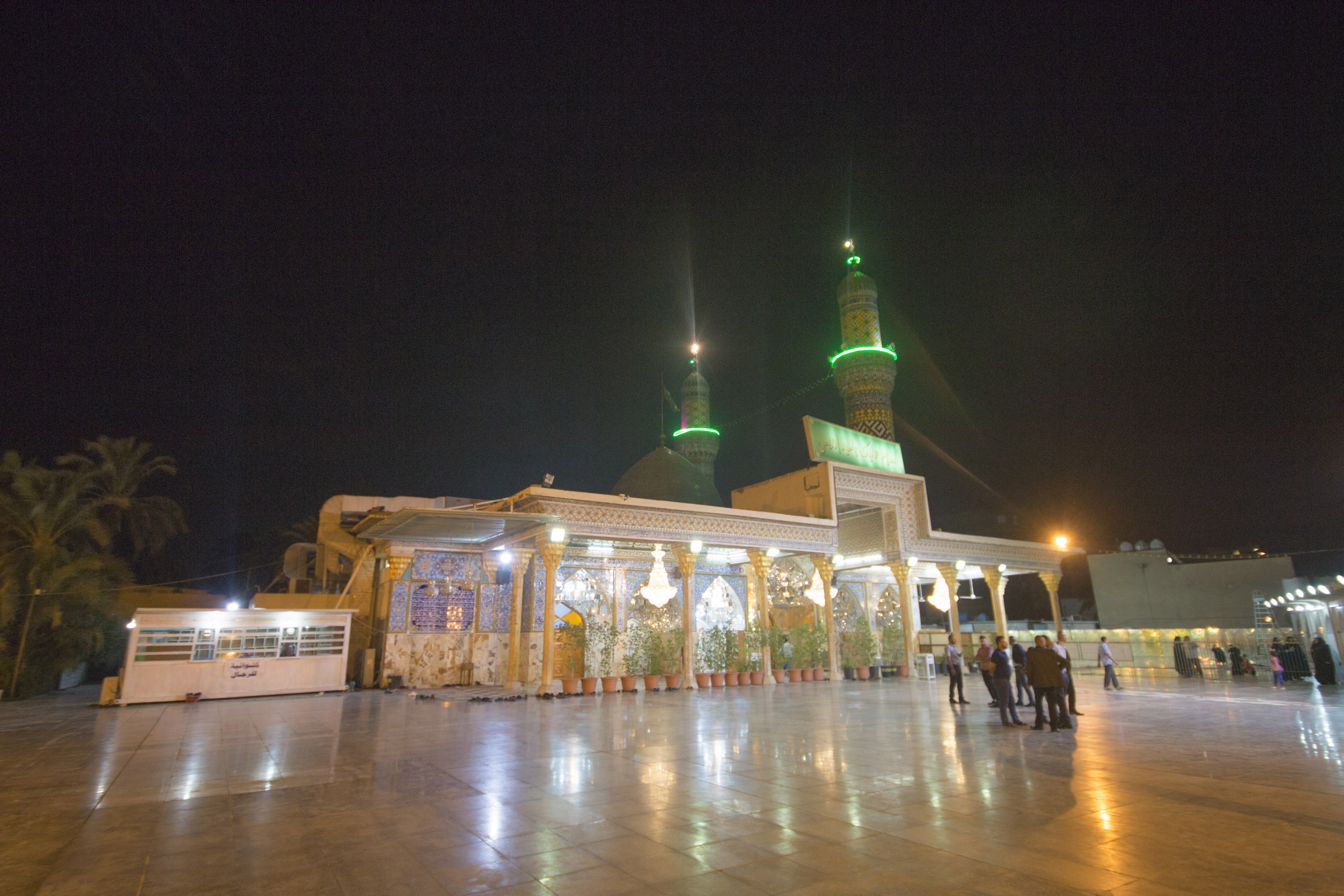 مرقد السيد أدريس في بغداد ويقع في منطقة الكرادة الشرقية وهو من المراقد المشهورة عند طائفة الشيعة الإمامية